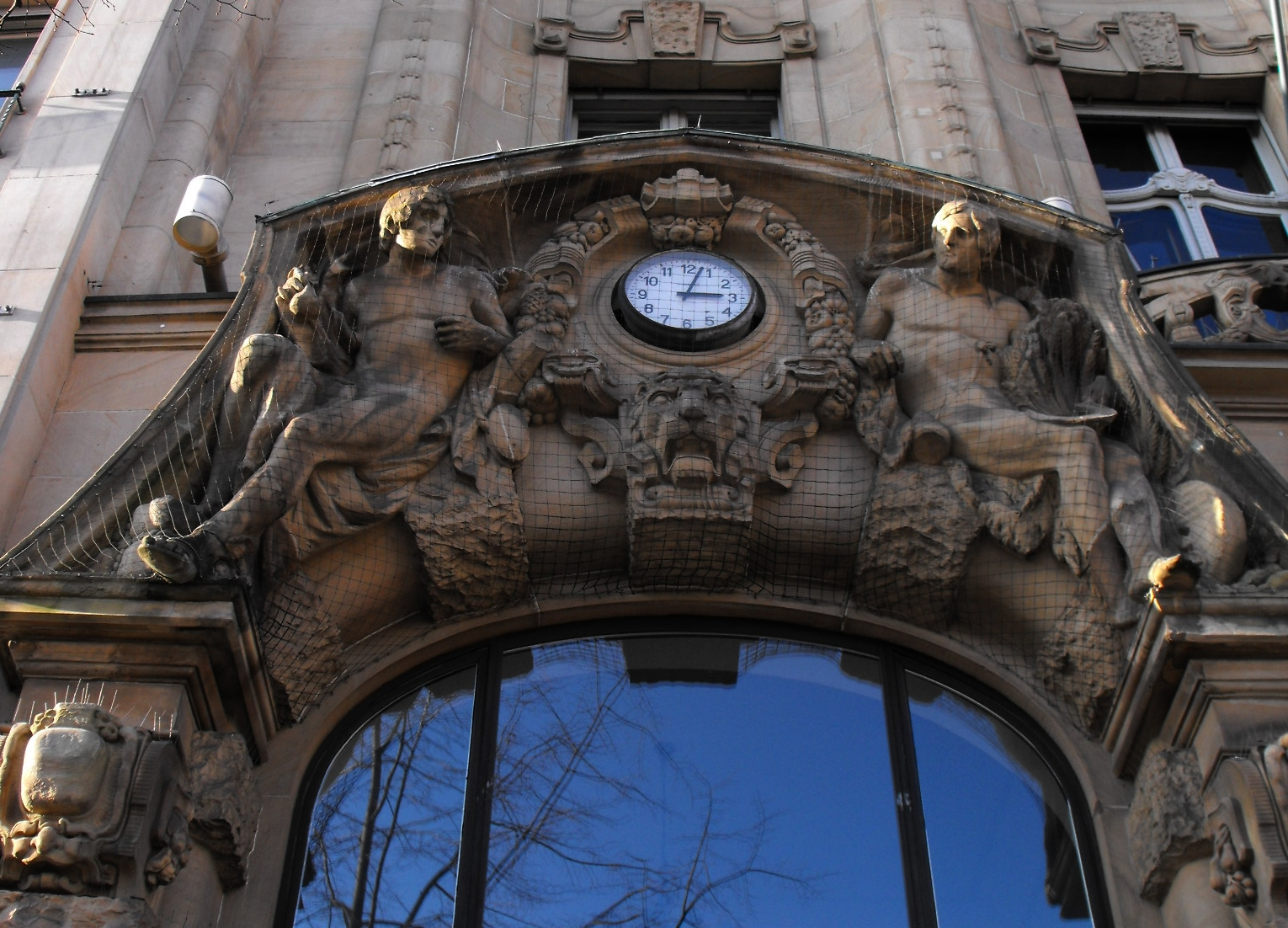 Das Portal des Bankhauses der Dresdner Bank am Kapuzinergraben in Aachen